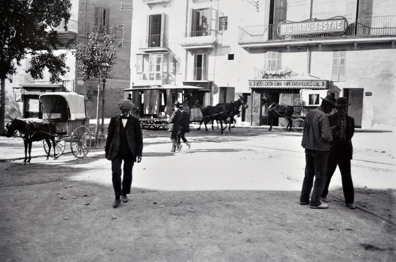 Un tranvía de mulas pasando por la Plaza de la Constitución, frente la Fuente de las Tortugas. Al fondo y a la izquierda de la imagen vemos dos "carrets" con su tiro. 1914.